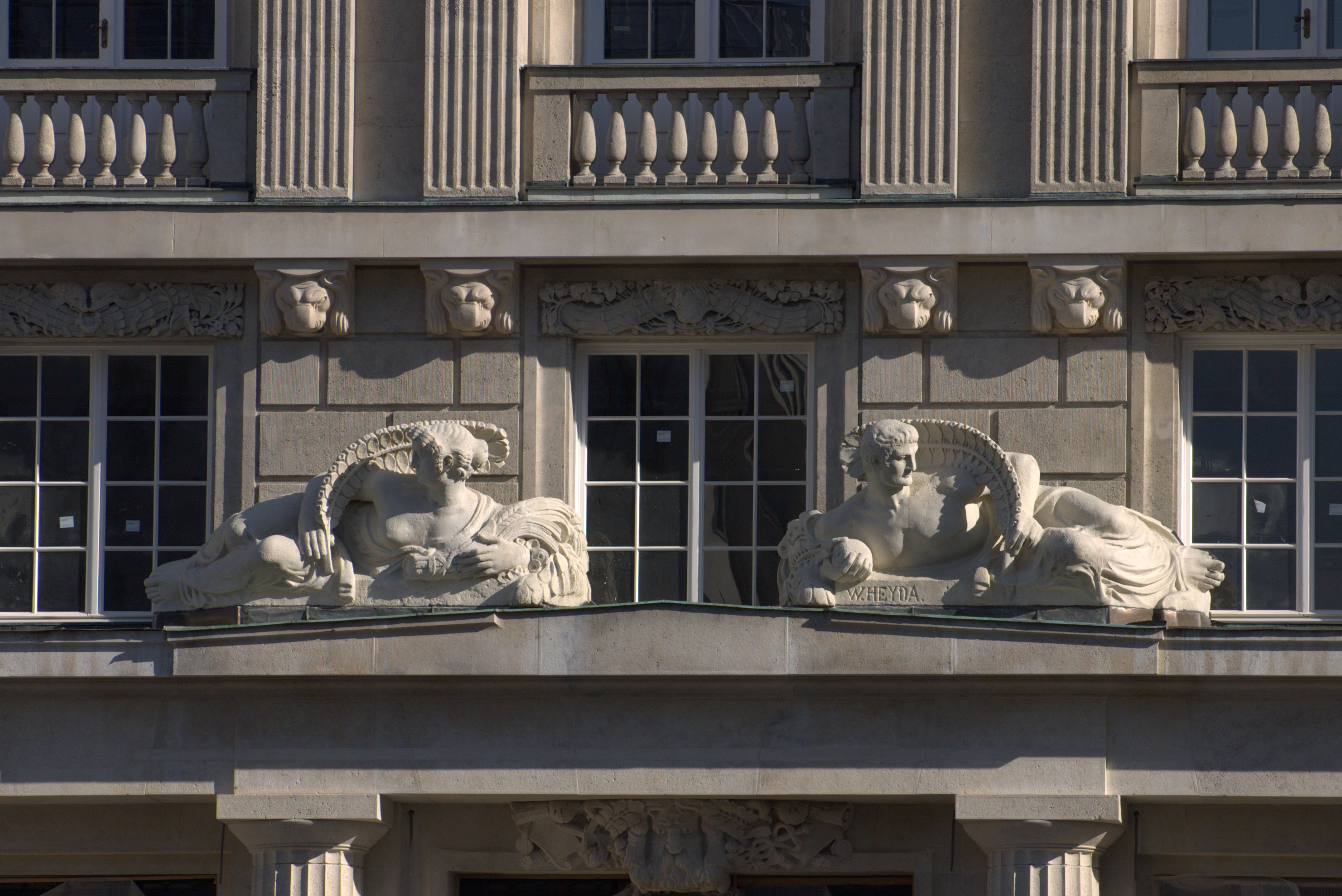 Ehem. Länderbank, urspr. nö. Escompte-Gesellschaft